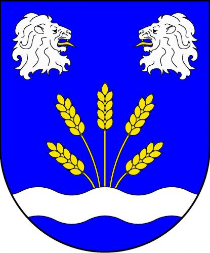 Nahořany, okres Náchod, znak